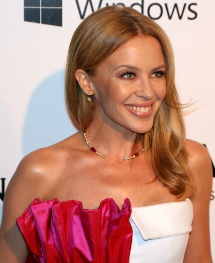 14 - Kylie Minogue